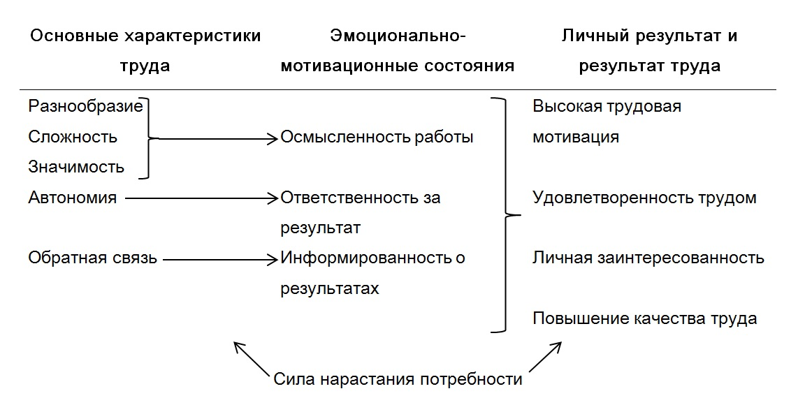 основные положения Теории характеристик работы Хакмена и Олдхема